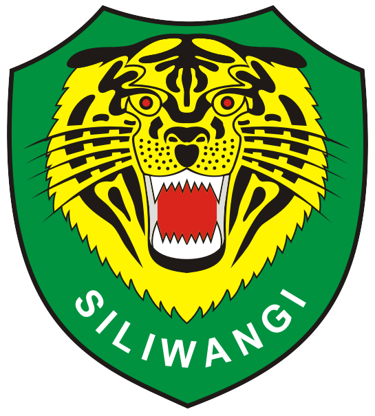 Gambar ini adalah Lambang Kodam III/Siliwangi